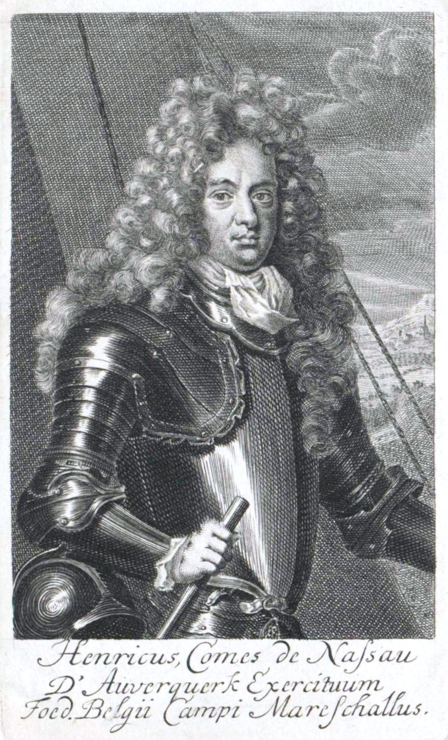 Heinrich von Nassau-Ouwerkerk (1640–1708)